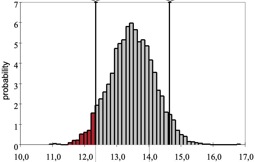 Expected Cash-Flow Shortfall